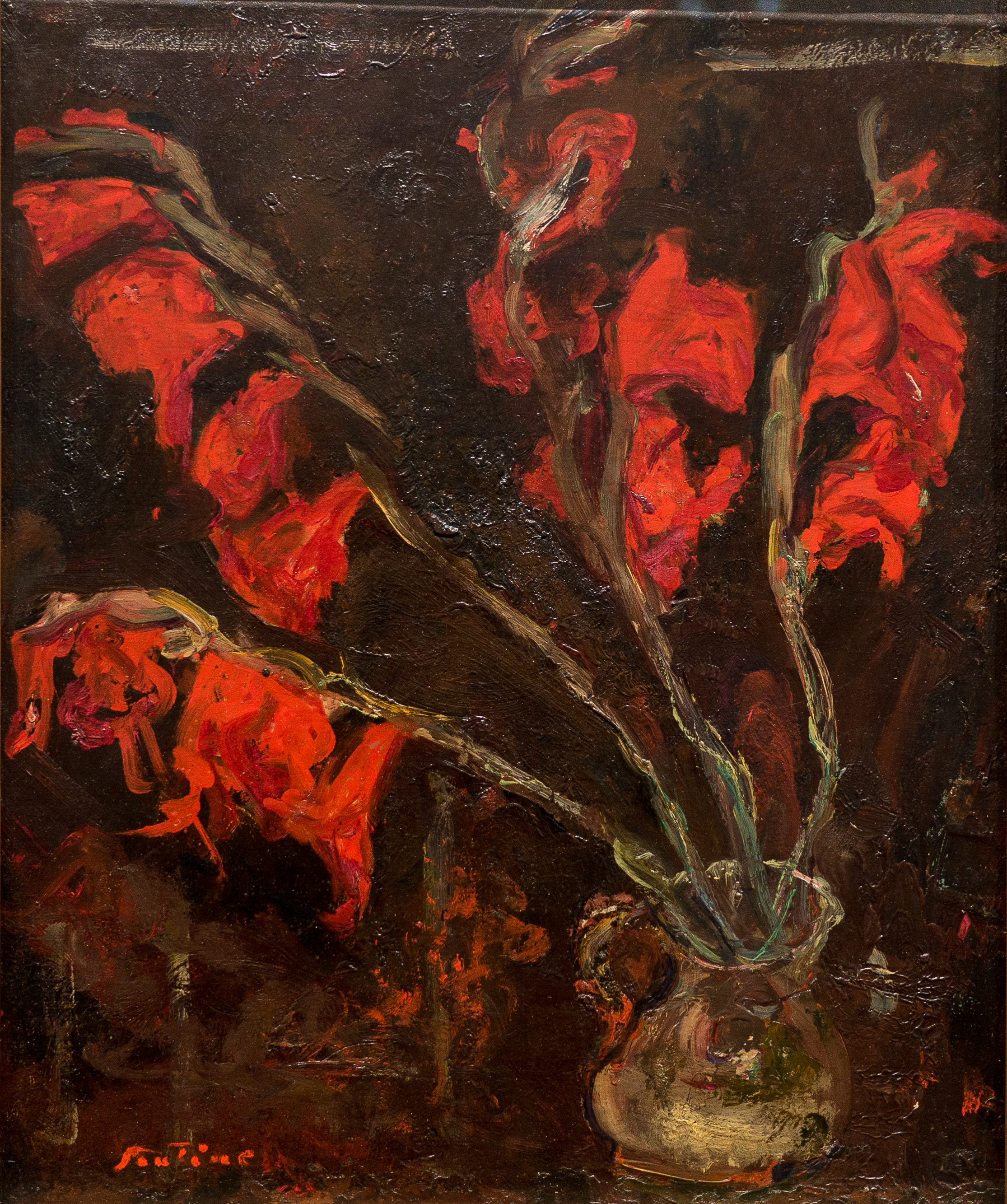 Chaïm Soutine (1893 - 1943), "Glaïeuls", huile sur toile, vers 1919, Coll. Jean Walter et Paul Guillaume, Musée de l'Orangerie, Paris